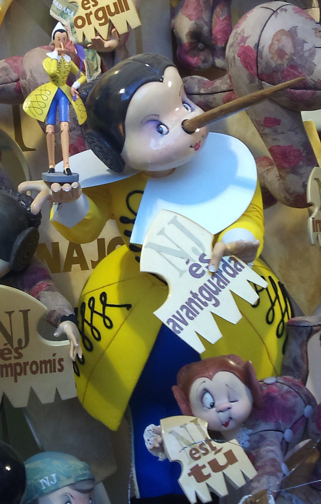 Ninot infantil de Na Jordana en 2012 que referencia el monument faller plantat per Na Jordana en 2001 "Pinotxada Universal".